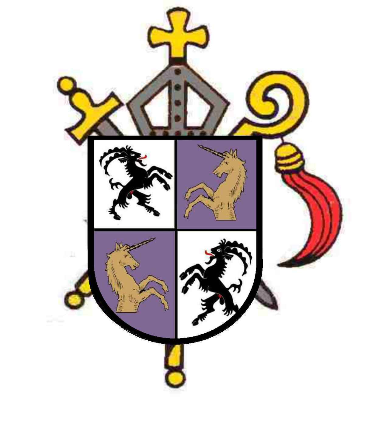 Wappen Ulrich VI. de (von) Mont, Fürstbischof von Chur 1661-1692